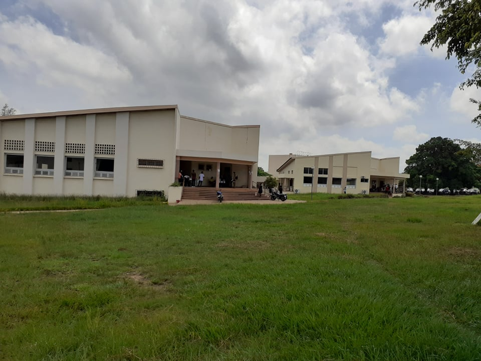 Amphithéâtre